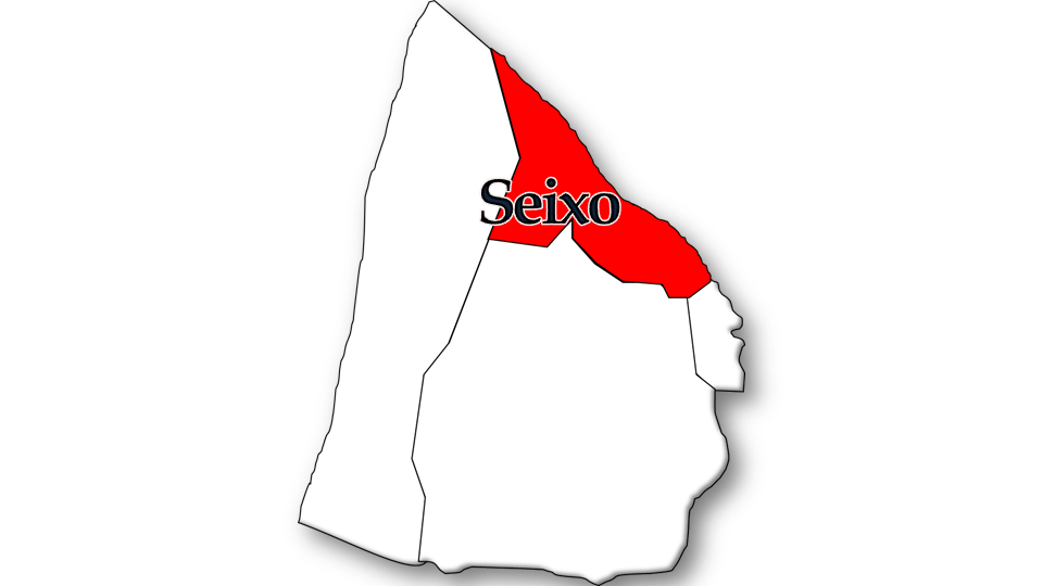 População